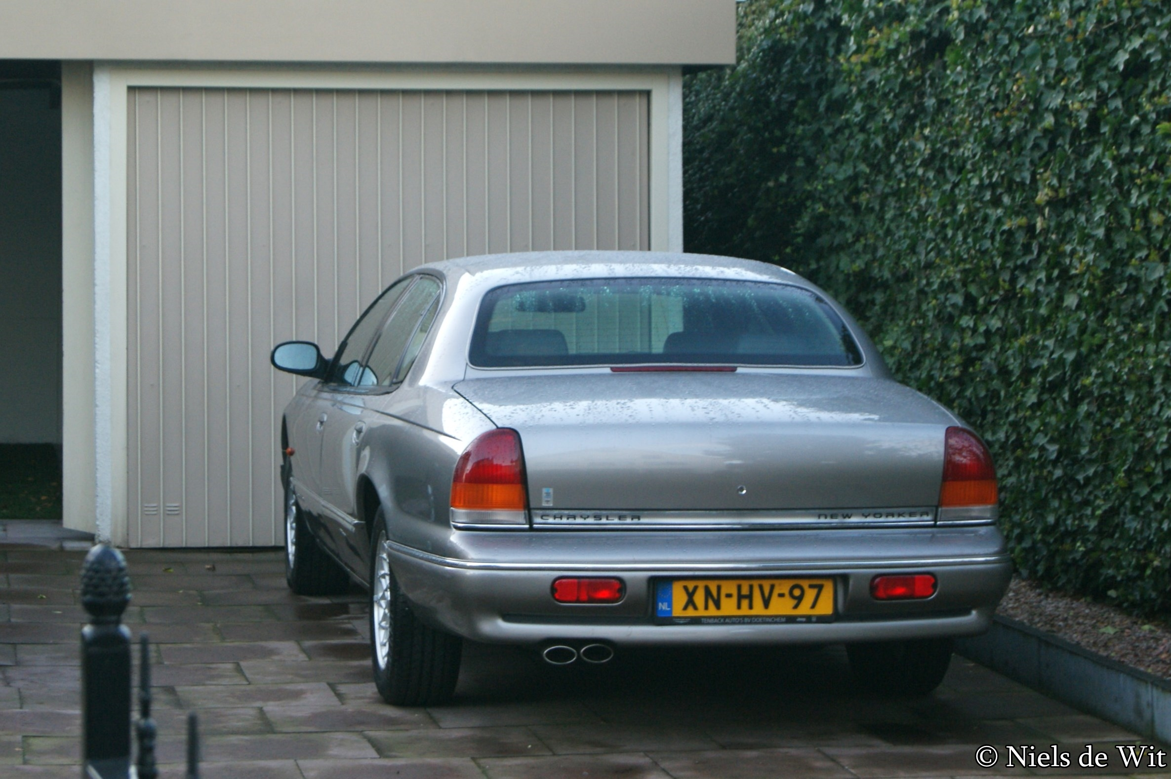 XN-HV-97